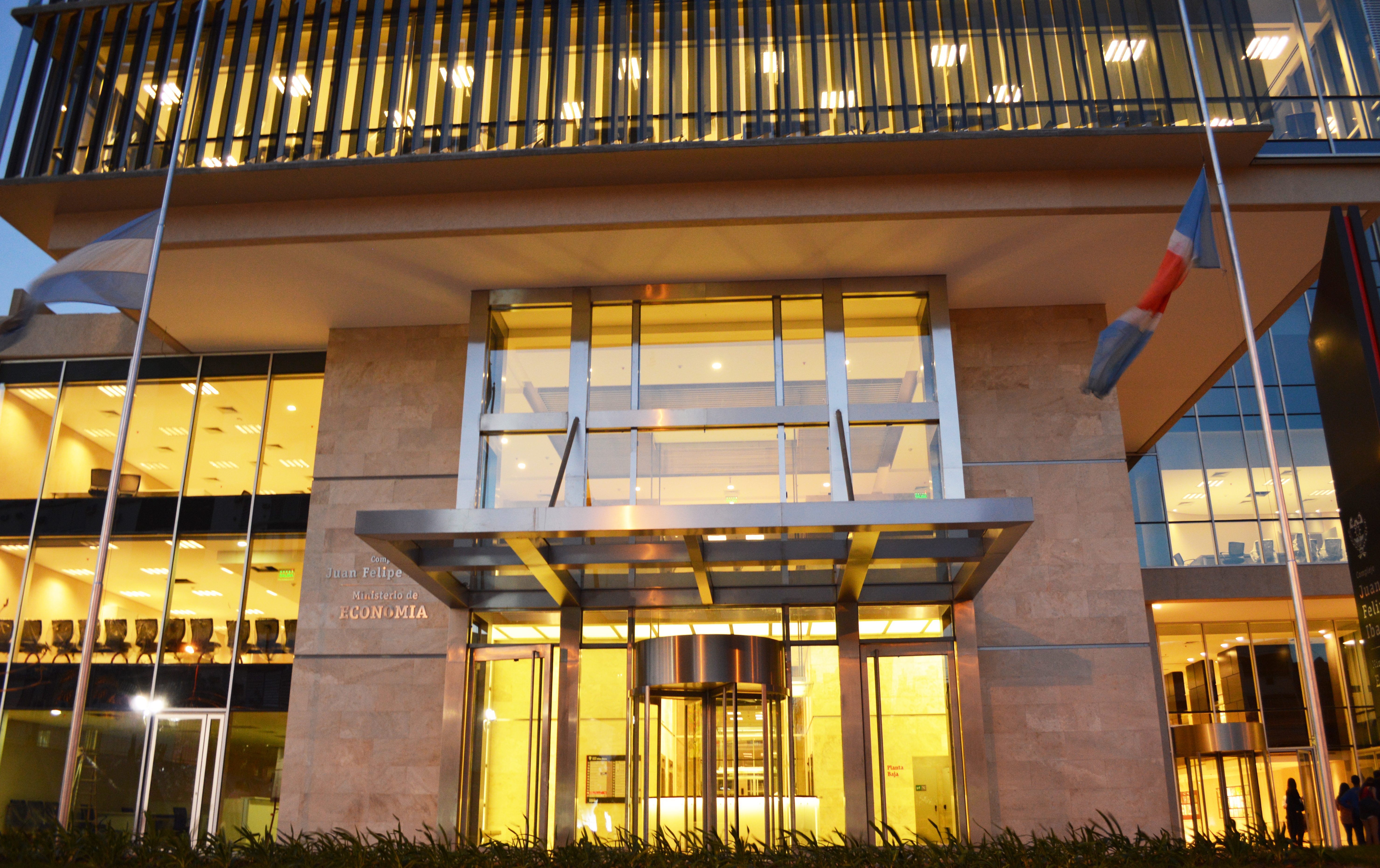 Ingreso al Complejo Juan Felipe Ibarra sobre Avenida Belgrano. Queda vinculado con calle 24 de Septiembre a través de una calle interna a modo de Paseo Cultural.